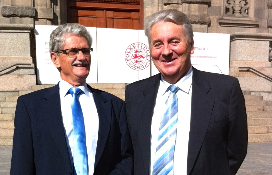 MF Edmund Joensen fra det færøske Sambandspartiet sammen med folketingsformand Mogens Lykketoft (S)